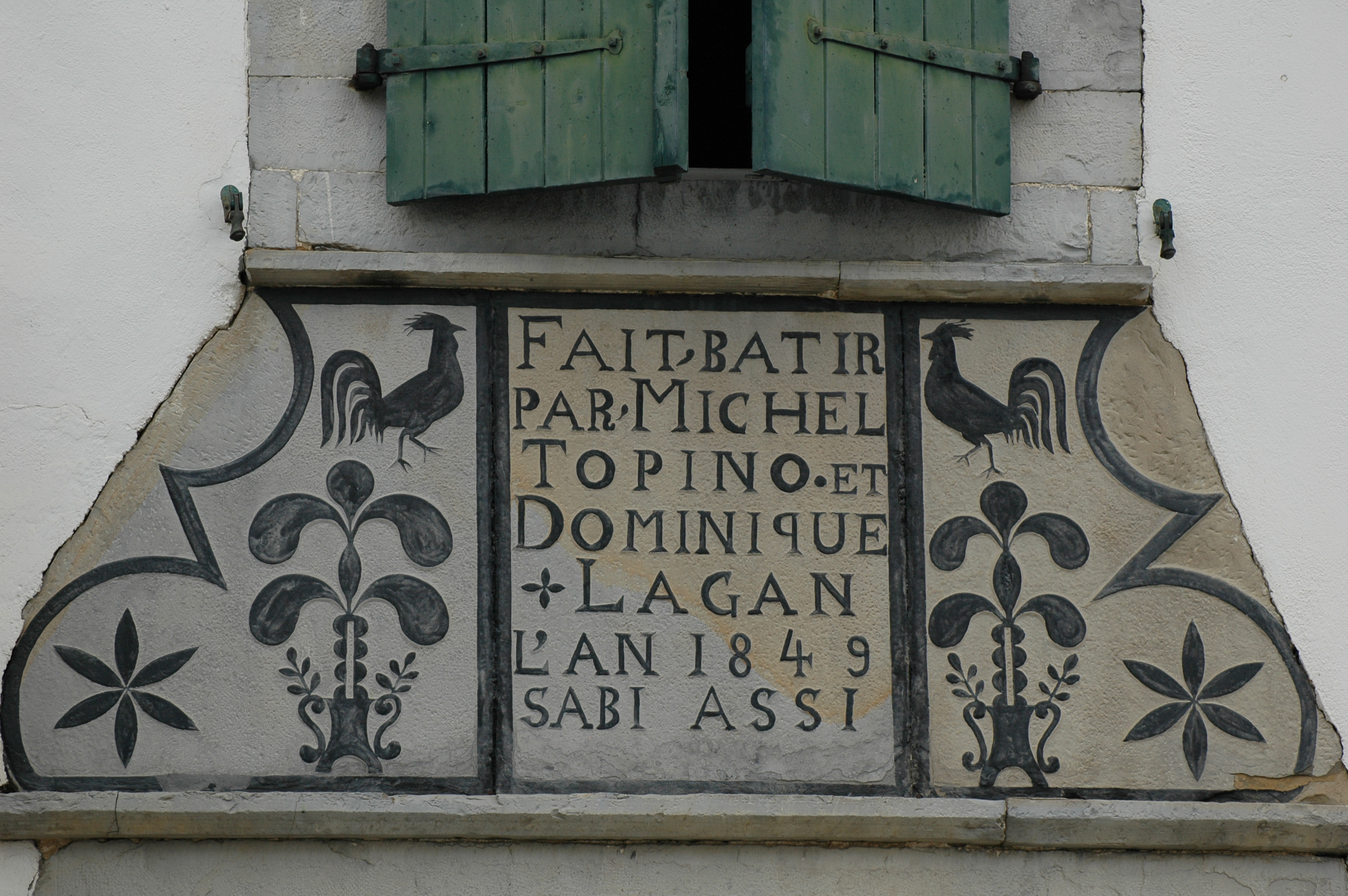 Iholdy, linteau sculpté, détail